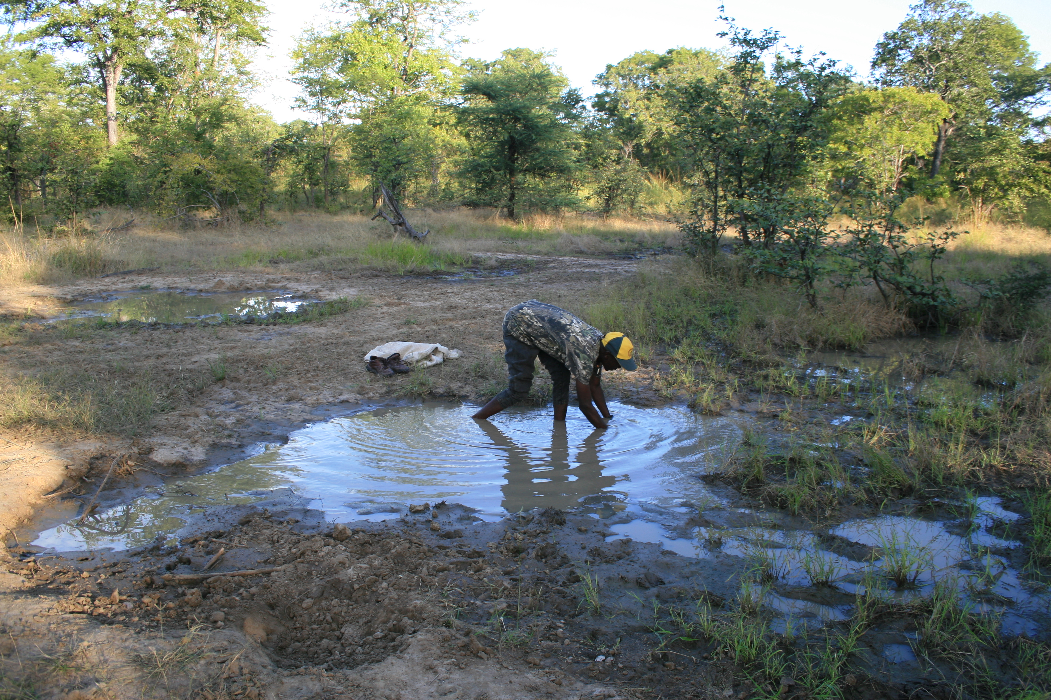 Kunda Man Trying to Catch a Protopterus, Luangwa Valley (Zambia)